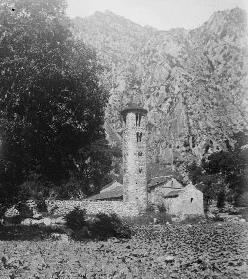 Imatge